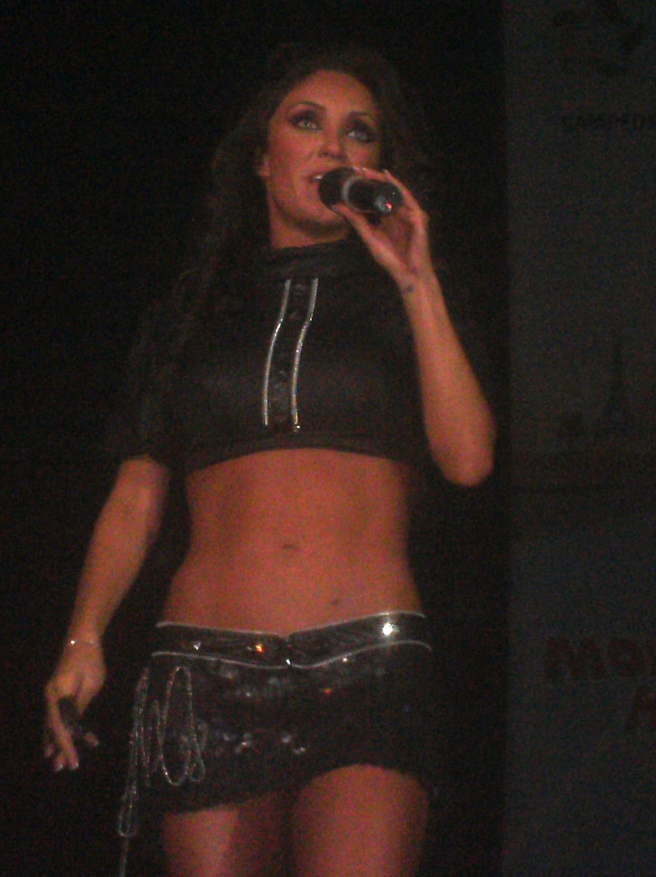 Anahí durante el concierto dado en el Luna Park, Buenos Aires, Argentina el 1 de diciembre del 2010